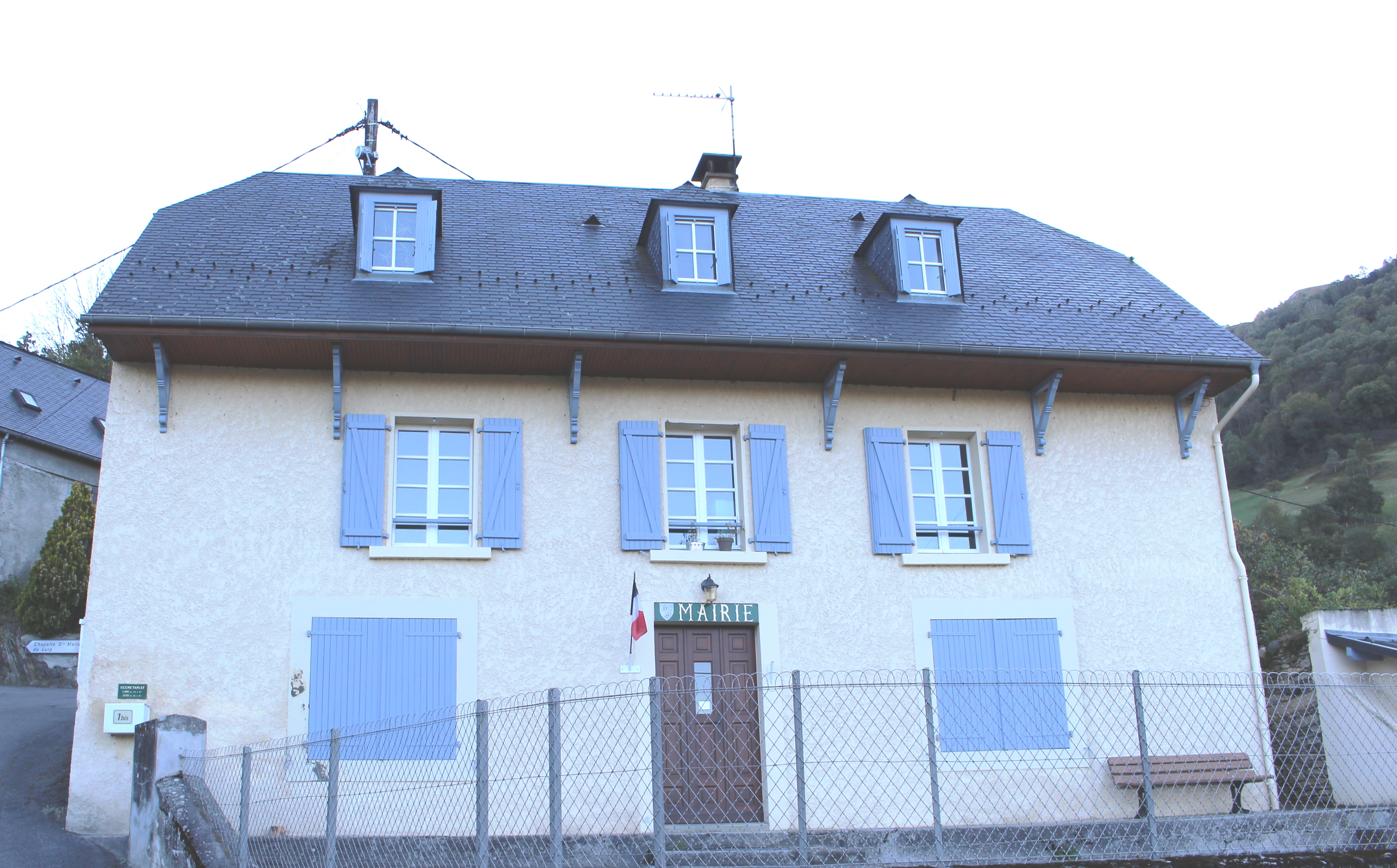 Mairie de Saint-Pastous (Hautes-Pyrénées)